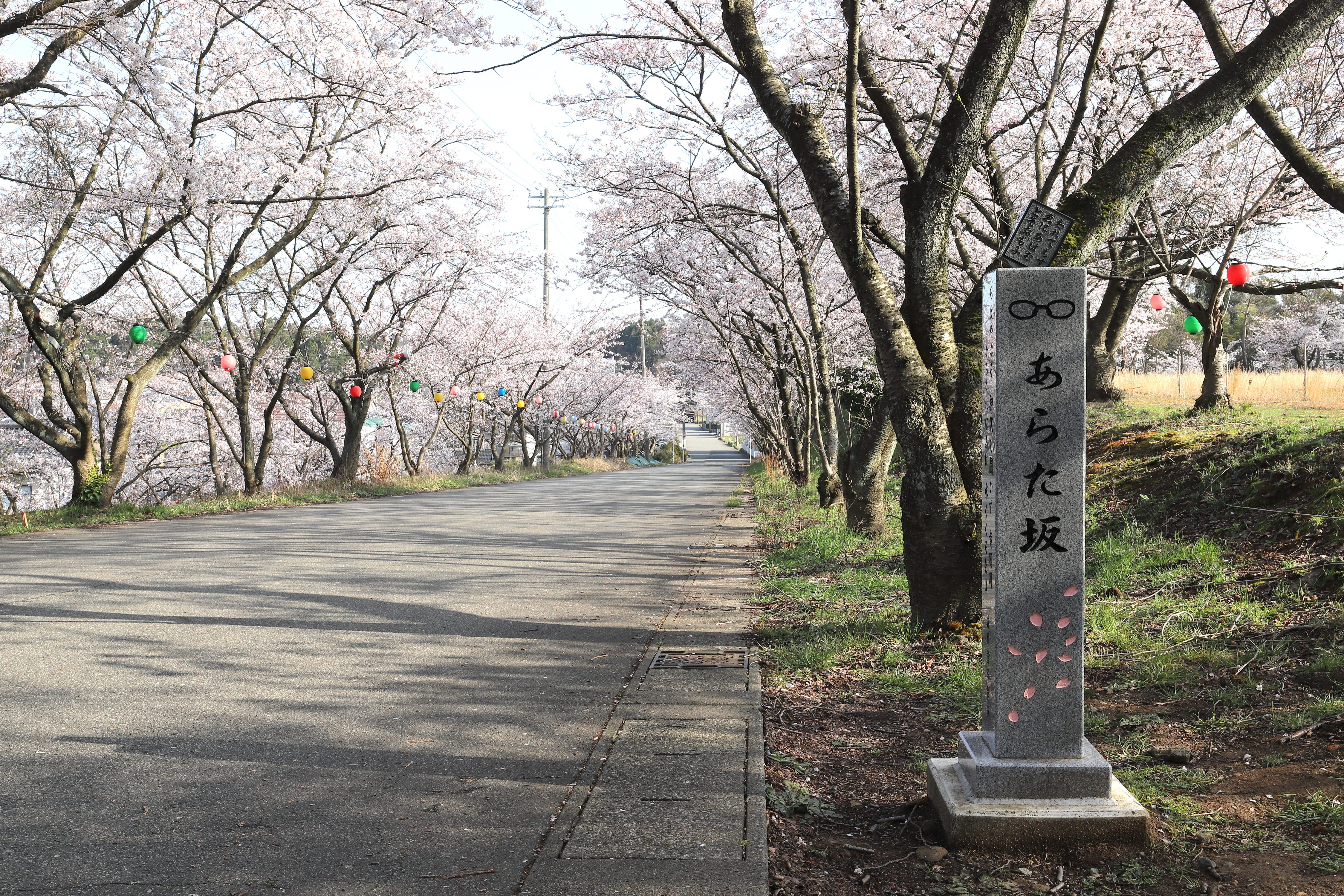 「ちはやふる」に登場する桜並木の坂道を「あらた坂」と命名 Canon EOS 6D Mark II